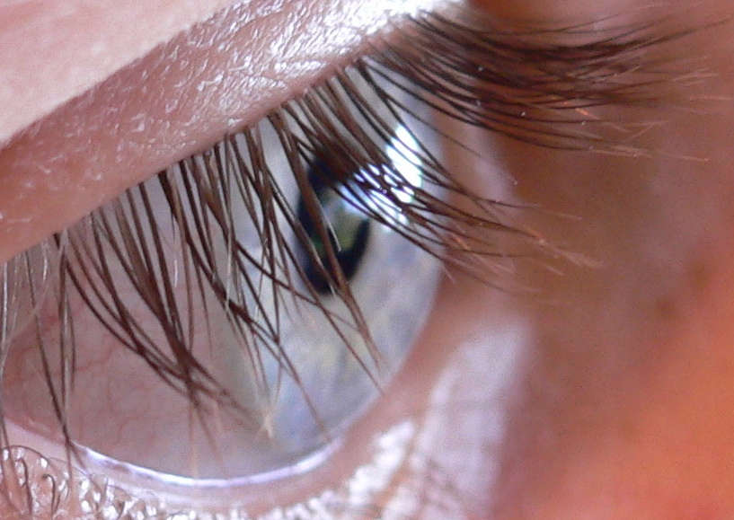 ܐܪܡܝܐ : ܬܠܝܦ̈ܐ.